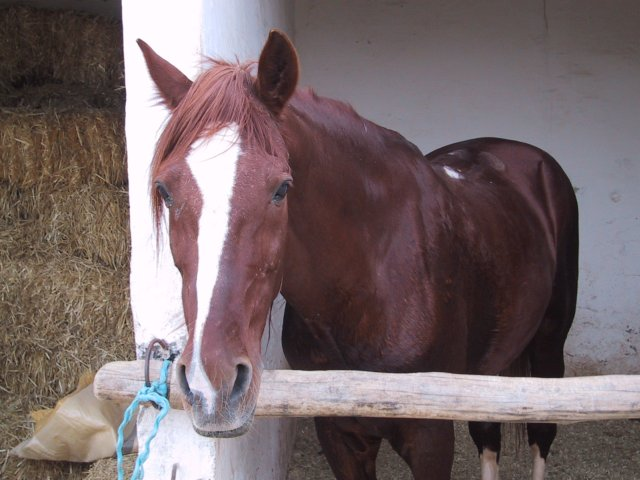 Cheval barbé dénommé Micado du club Pyramide à Agadir, Maroc.